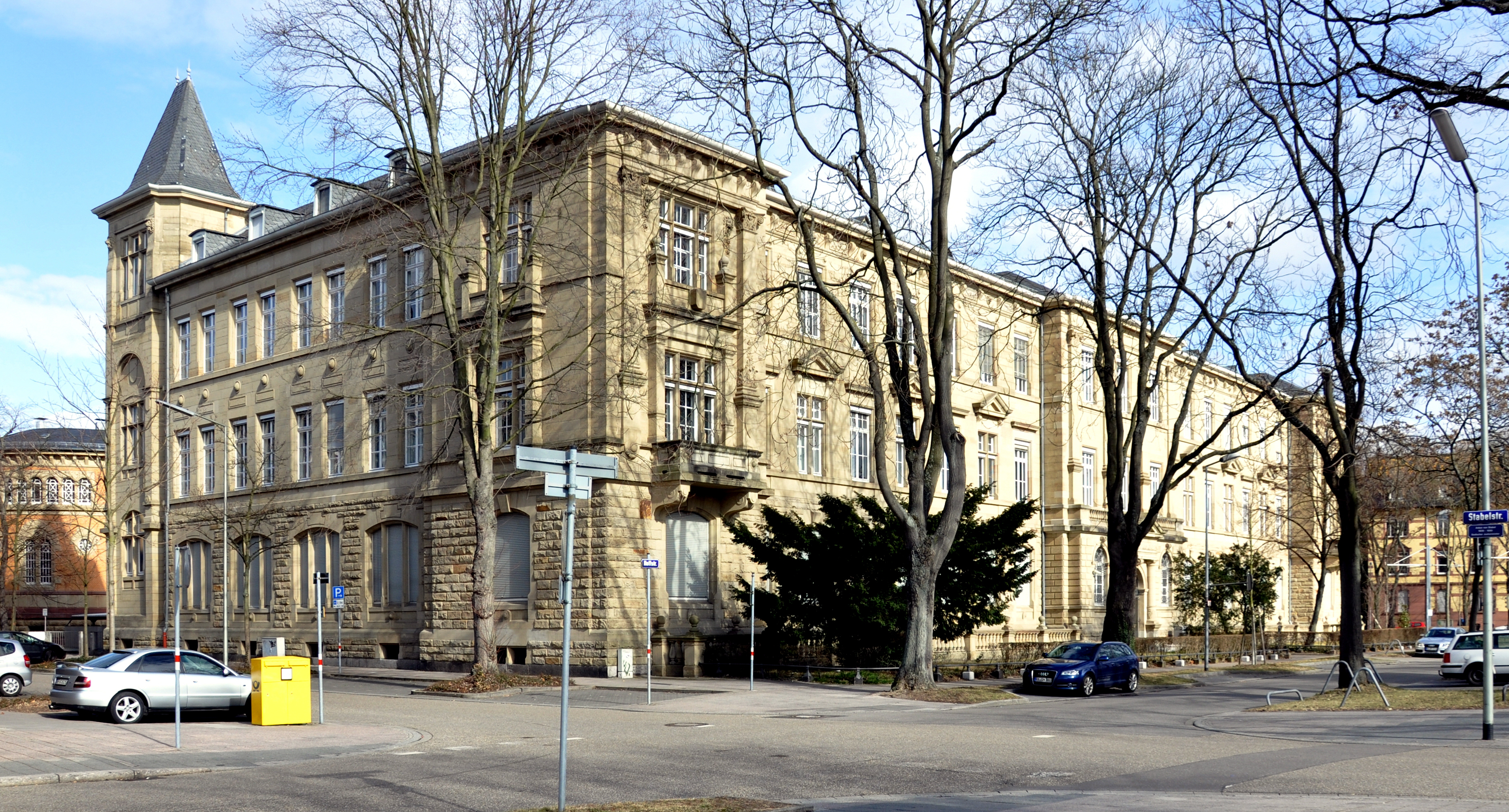 Oberlandesgericht Karlsruhe in der Karlsruher Weststadt